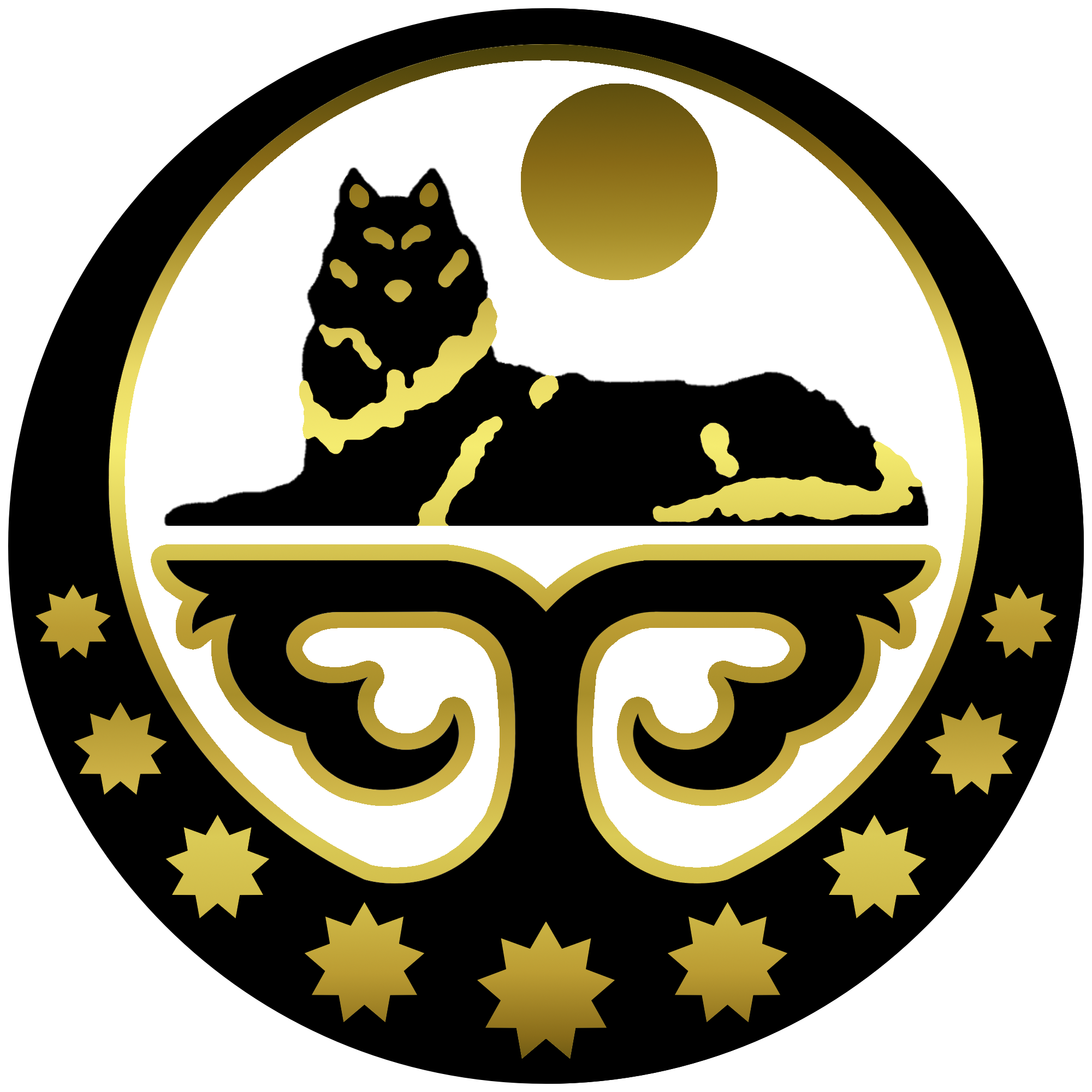 Нохчийн: На̇хчиє къо̇ма Хјуост